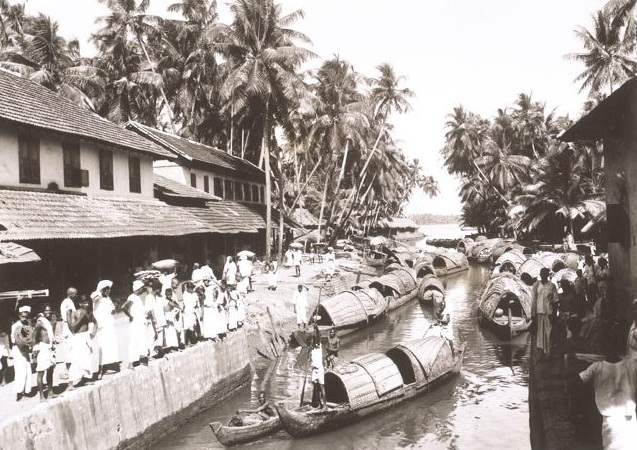 മനുഷ്യനിർമിതമായ കനാൽ യാത്രയ്ക്കുപയോഗിക്കുന്നു. 1930-11-03 നും 1937-03-11നും ഇടയിലെടുത്ത ചിത്രം.